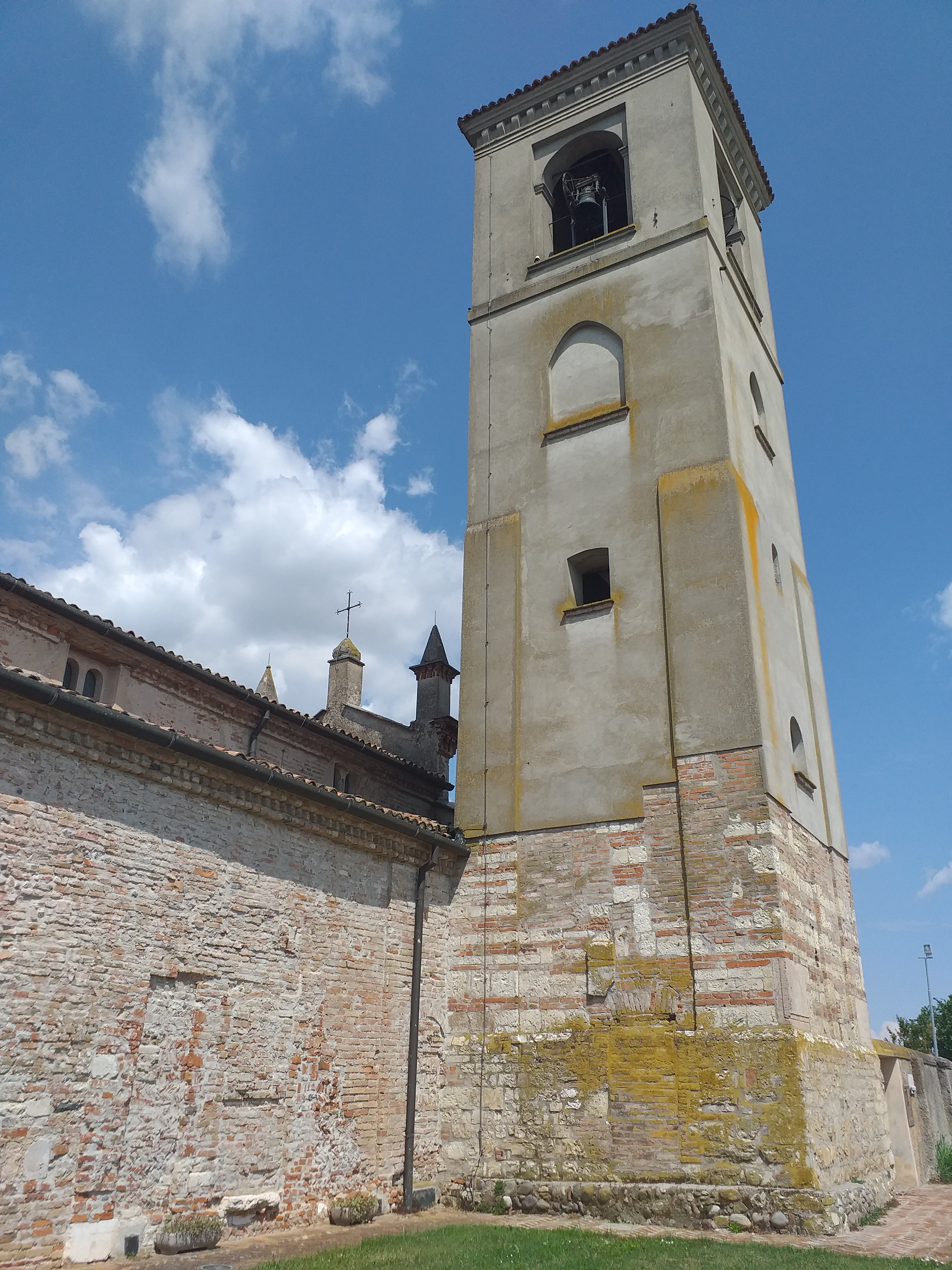 Campanile pieve corticelle